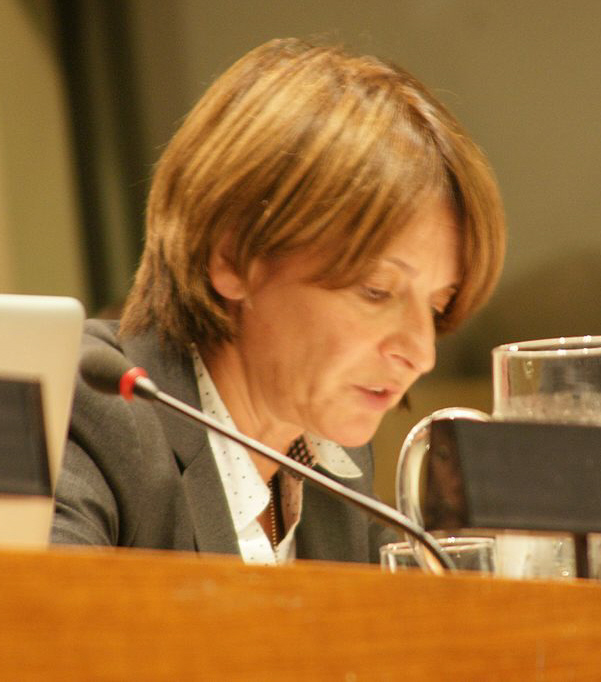 Mona Juul, norwegische Diplomatin und Ständige Repräsentantin Norwegens bei den Vereinten Nationen UN, 2009